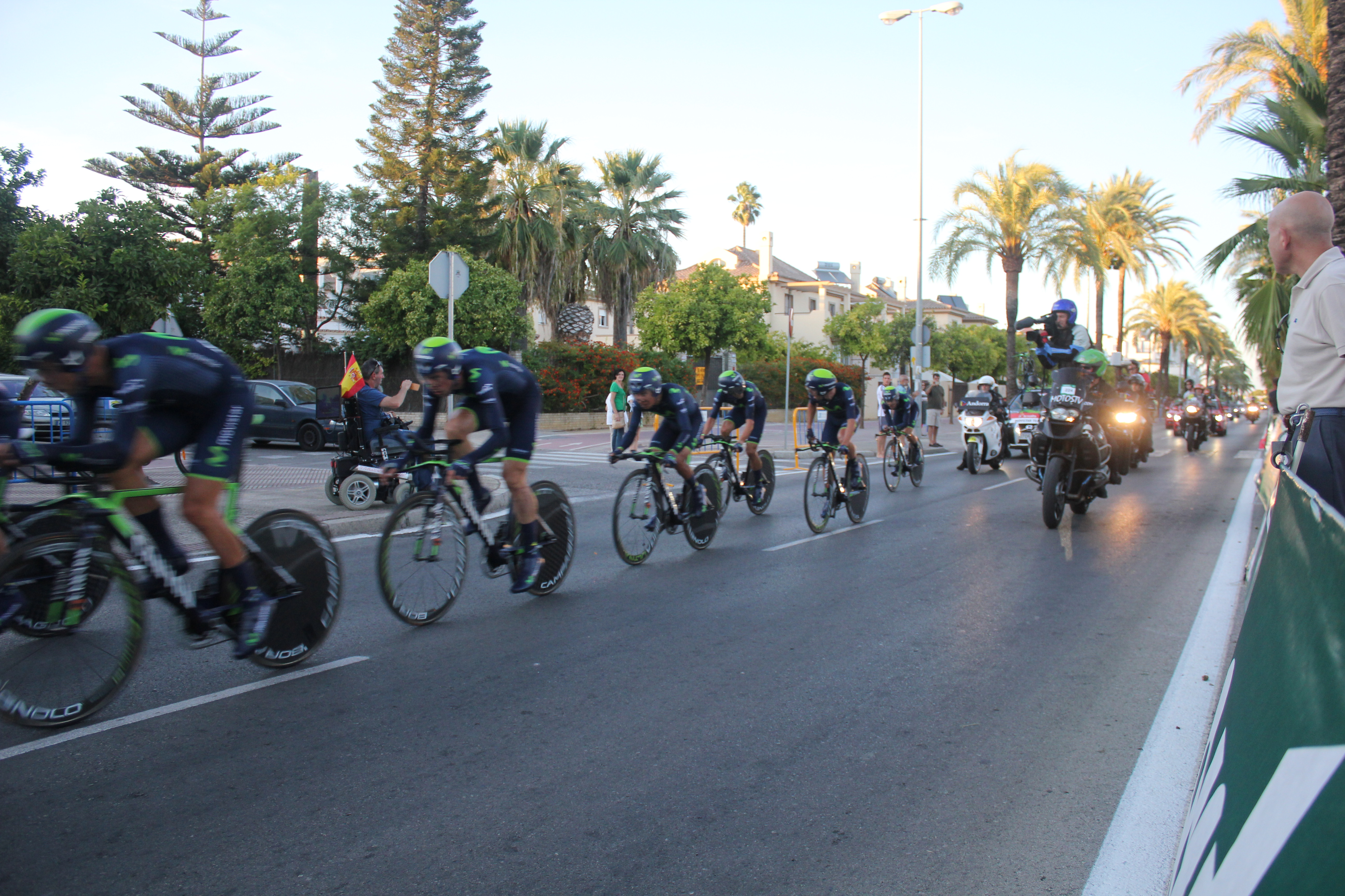 Primera etapa de la Vuelta Ciclista a España 2014, Jerez de la Frontera (Andalucía, España)